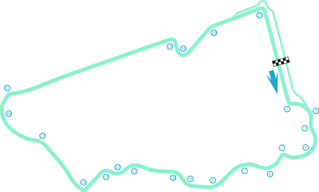 Circuito cittadino della gara inaugurale della 5° stagione.